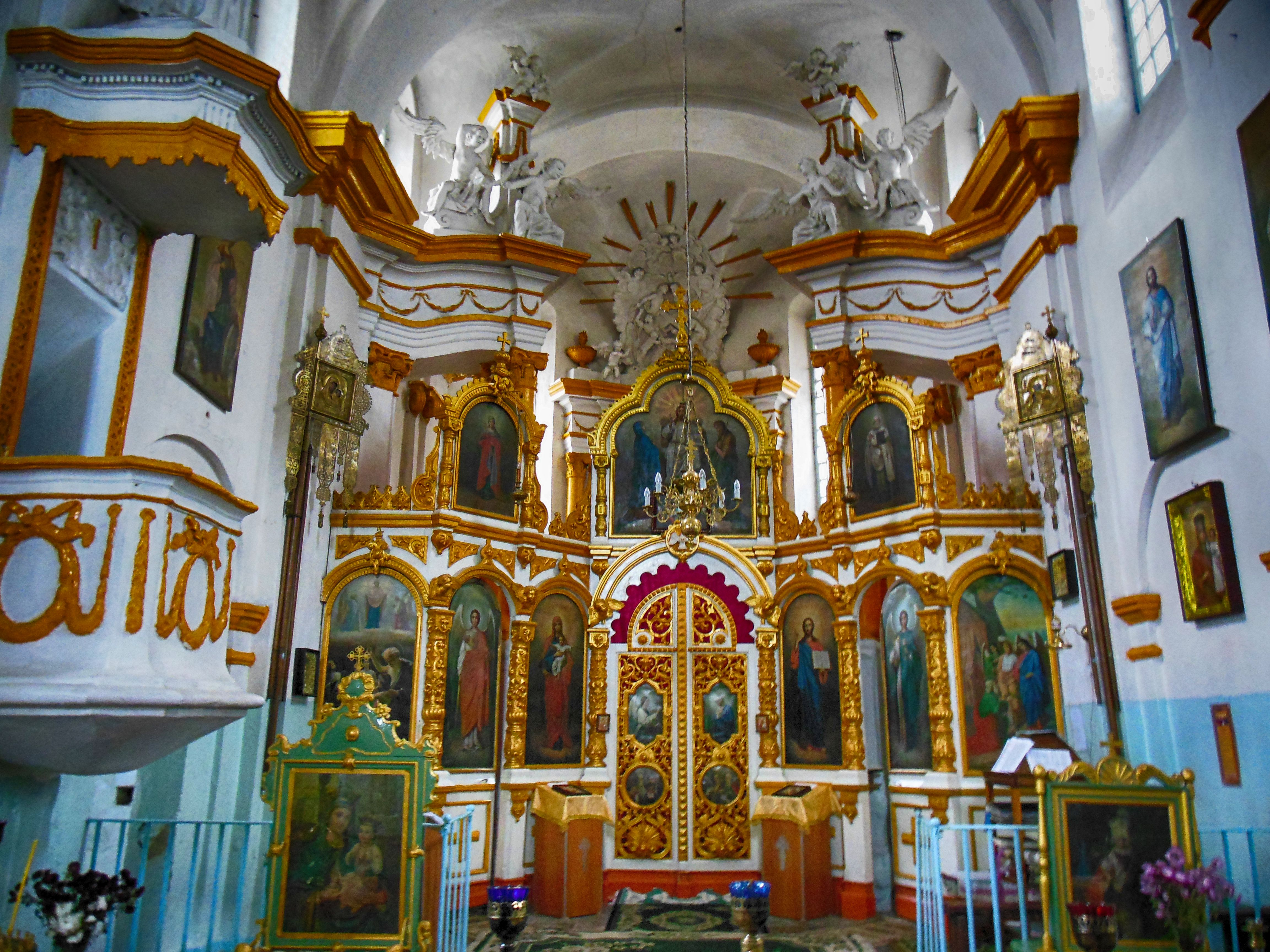 Беларуская (тарашкевіца): Троіцкая царква. в. Вольна This is a photo of Belarusian heritage monument. Reference number: 112Г000051 ( WLM)